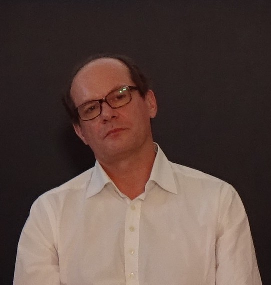 Herec slovenského původu Adrian Jastraban.